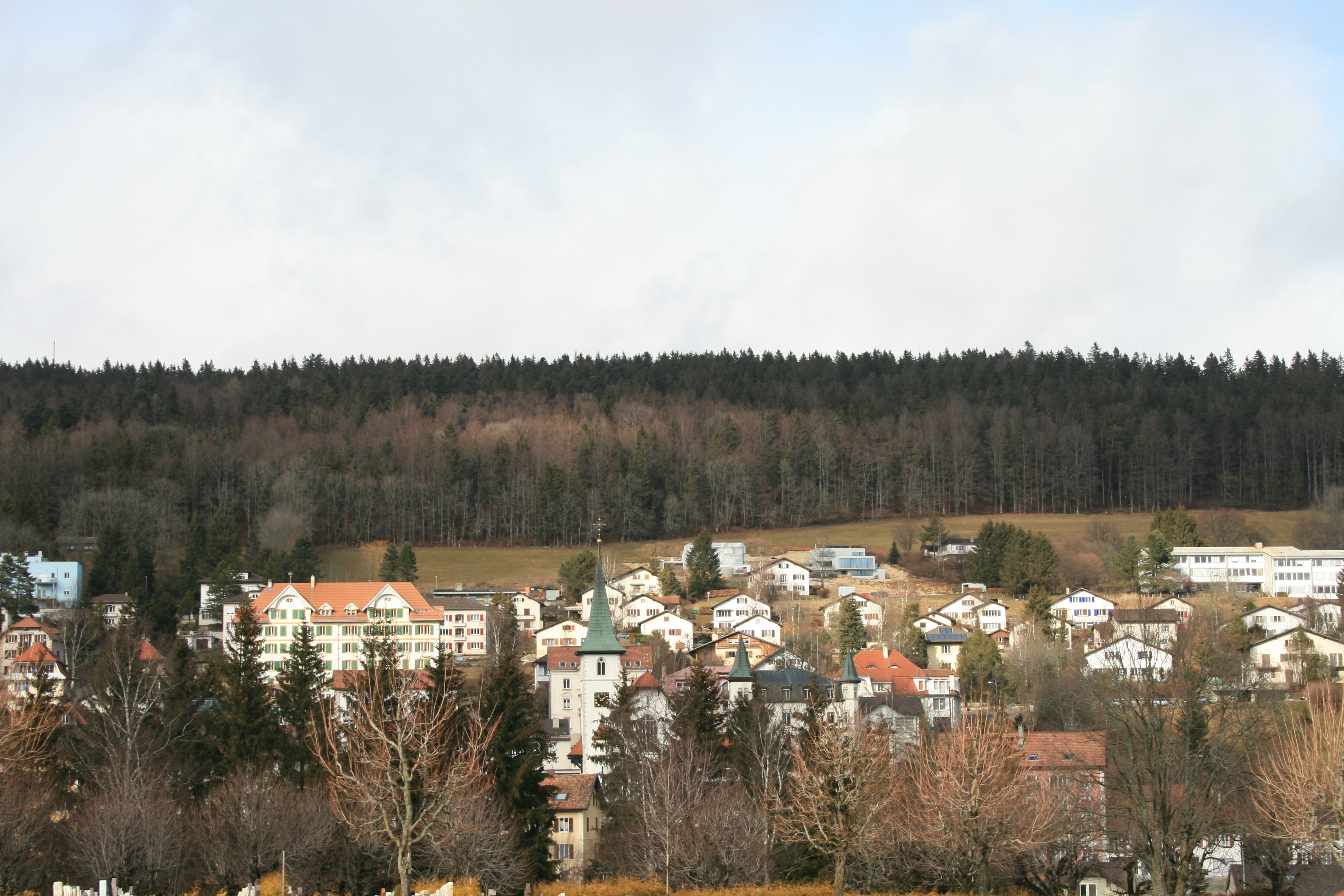 Tramelan